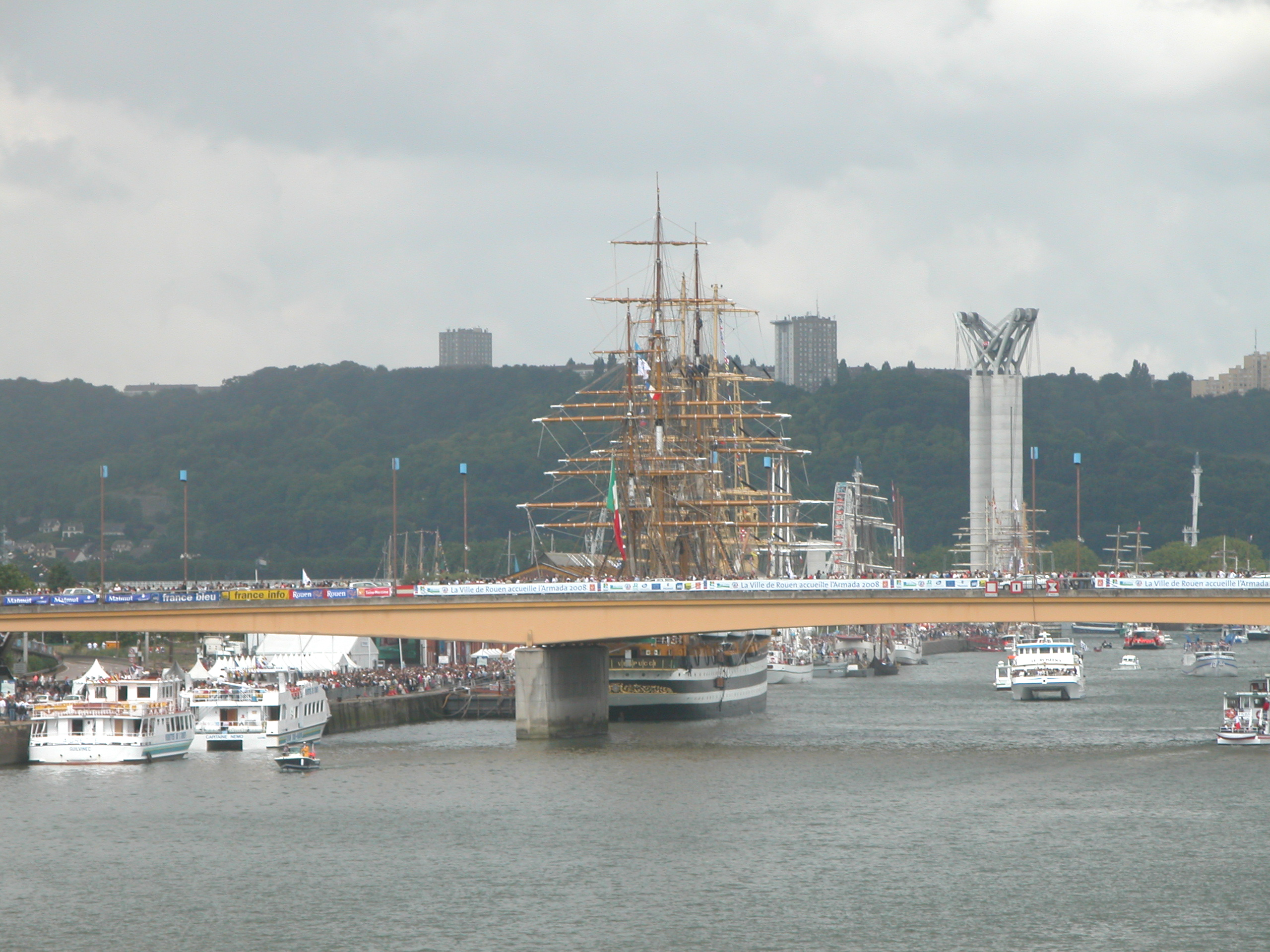 Vue générale de l'Armada 2008 et du nouveau pont Gustave Flaubert depuis le pont Jeanne d'Arc. 13/07/2008 Photo personnelle - Own Work.